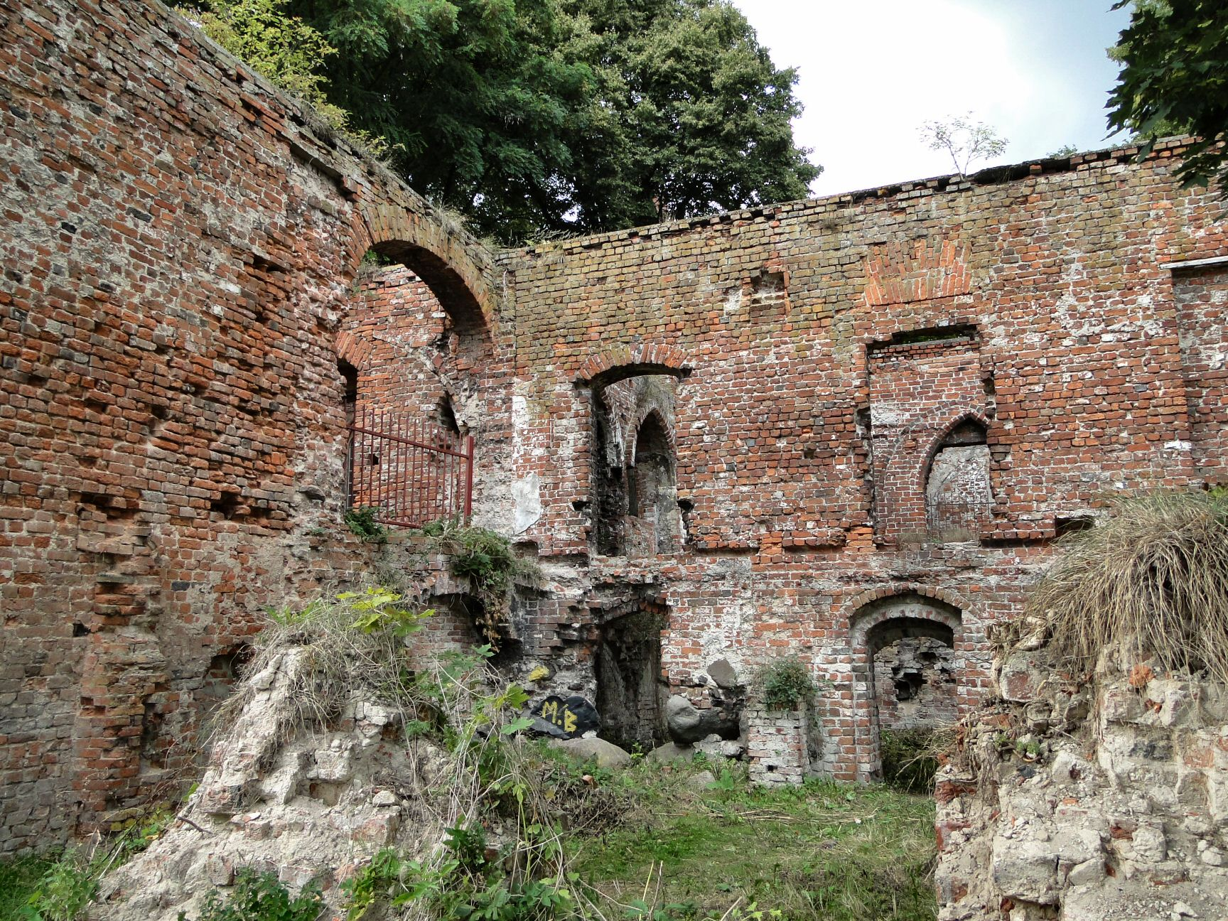 Ruiny klasztoru augustianów w Policach Jasienicy